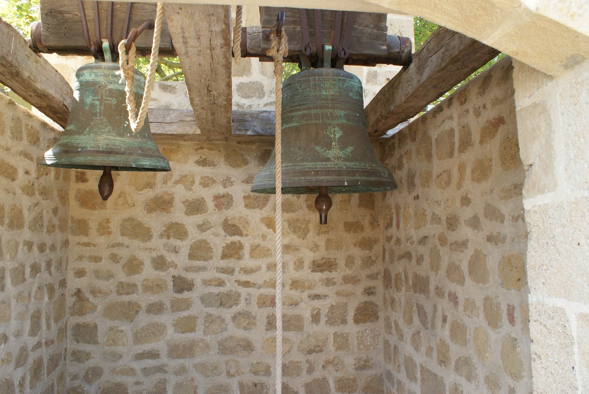 De klokkentoren.